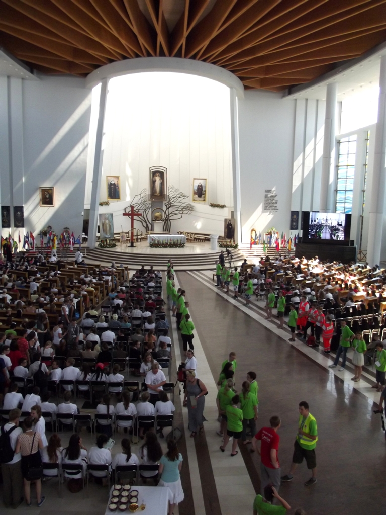 Zdjęcie zrobione podczas wydarzenia w "Rio w Krakowie", w Sanktuarium Bożego Miłosierdzia w Łagiewnikach.